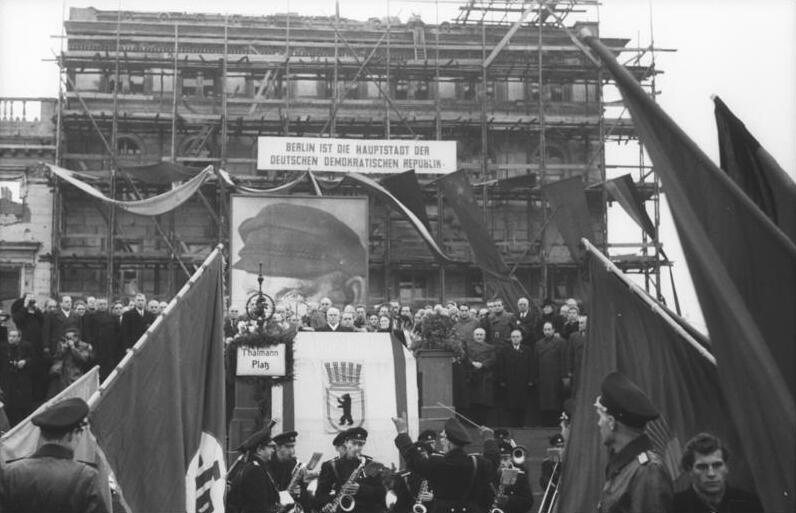 Ein Jahr demokratischer Magistrat Vom 28.11. - 30.11.49 fanden in Berlin anläßlich des einjährigen Bestehens des demokratischen Magistrats von Berlin unter Oberbürgermeister Friedrich Ebert zahlreiche Veranstaltungen statt. Am Mittag des 30.11.49 fand die feierliche Umbenennung des Wilhelmplatzes in Berlin in "Thälmann-Platz" statt. Oberbürgermeister Ebert nahm die Umbenennung vor. UBz: Beim Absingen der Nationalhymne wurden die Fahnen gesenkt. Aufn.: Illus-Rudolph 4624-49 30.11.49